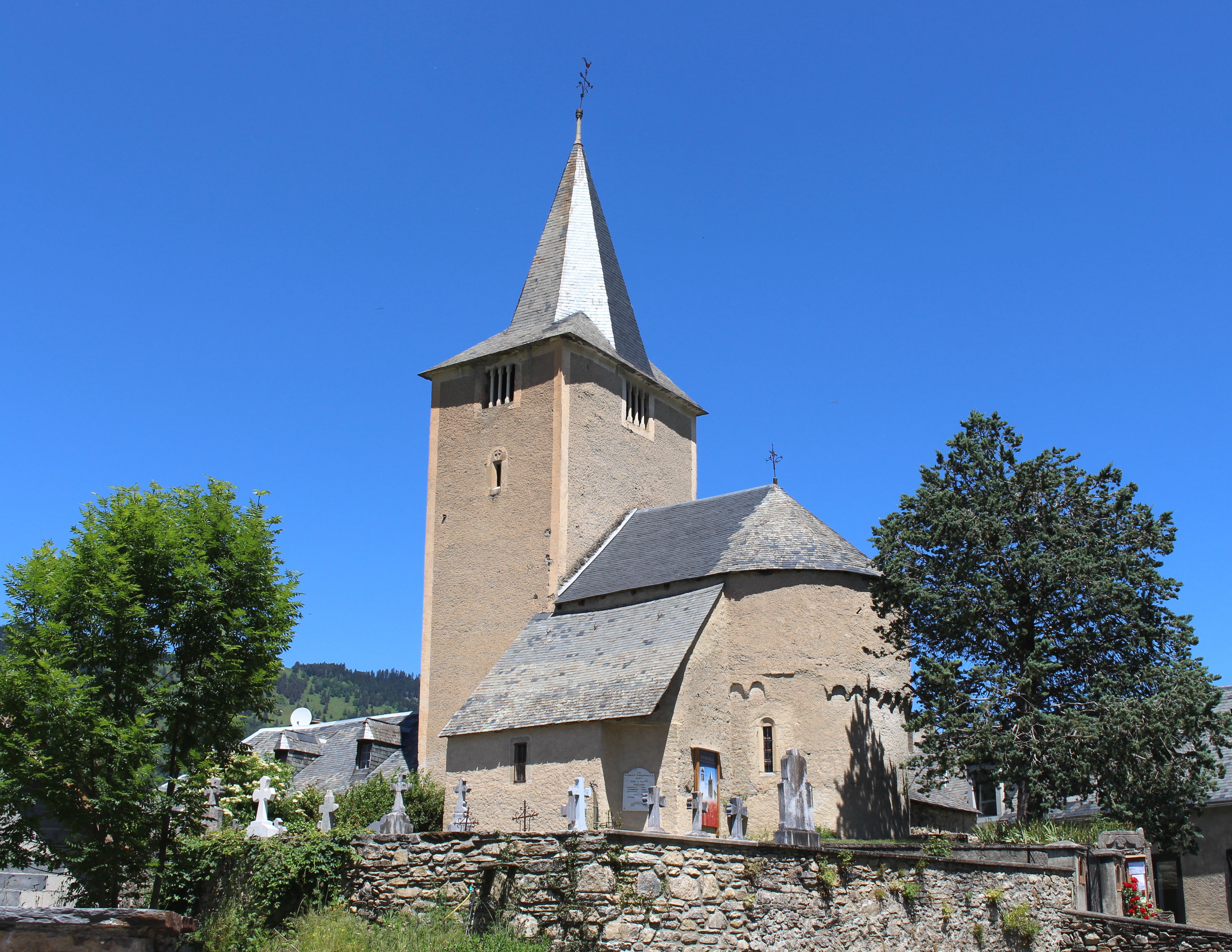 Église Saint-Pierre d'Estarvielle (Hautes-Pyrénées)